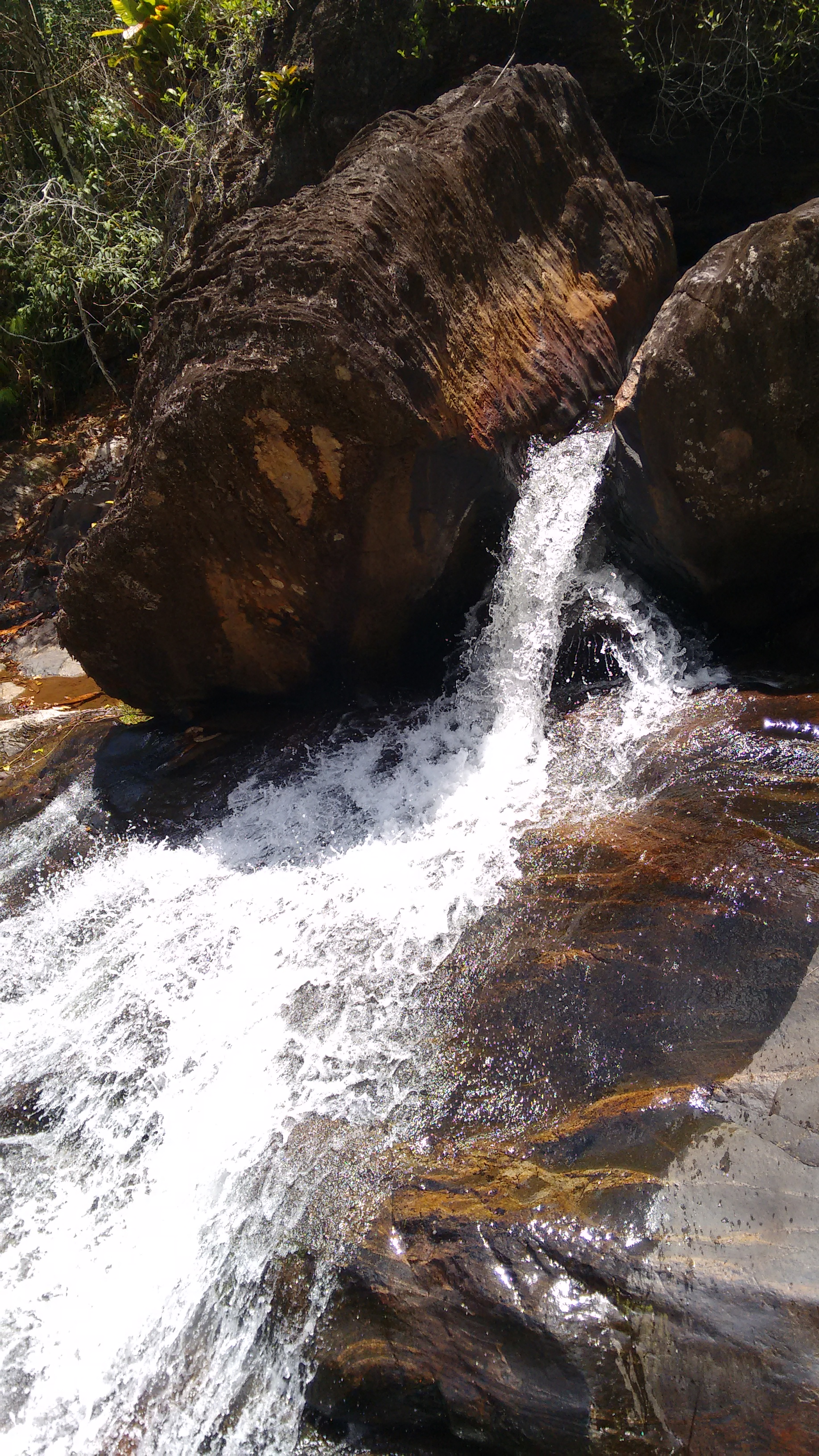 Região do Javí - Serra das Lontras